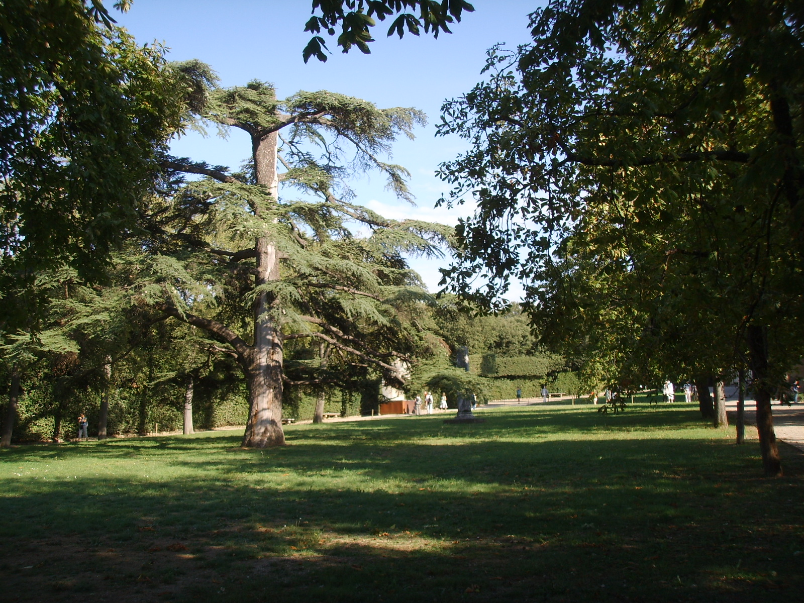 Boboli, prato dell'uccellare